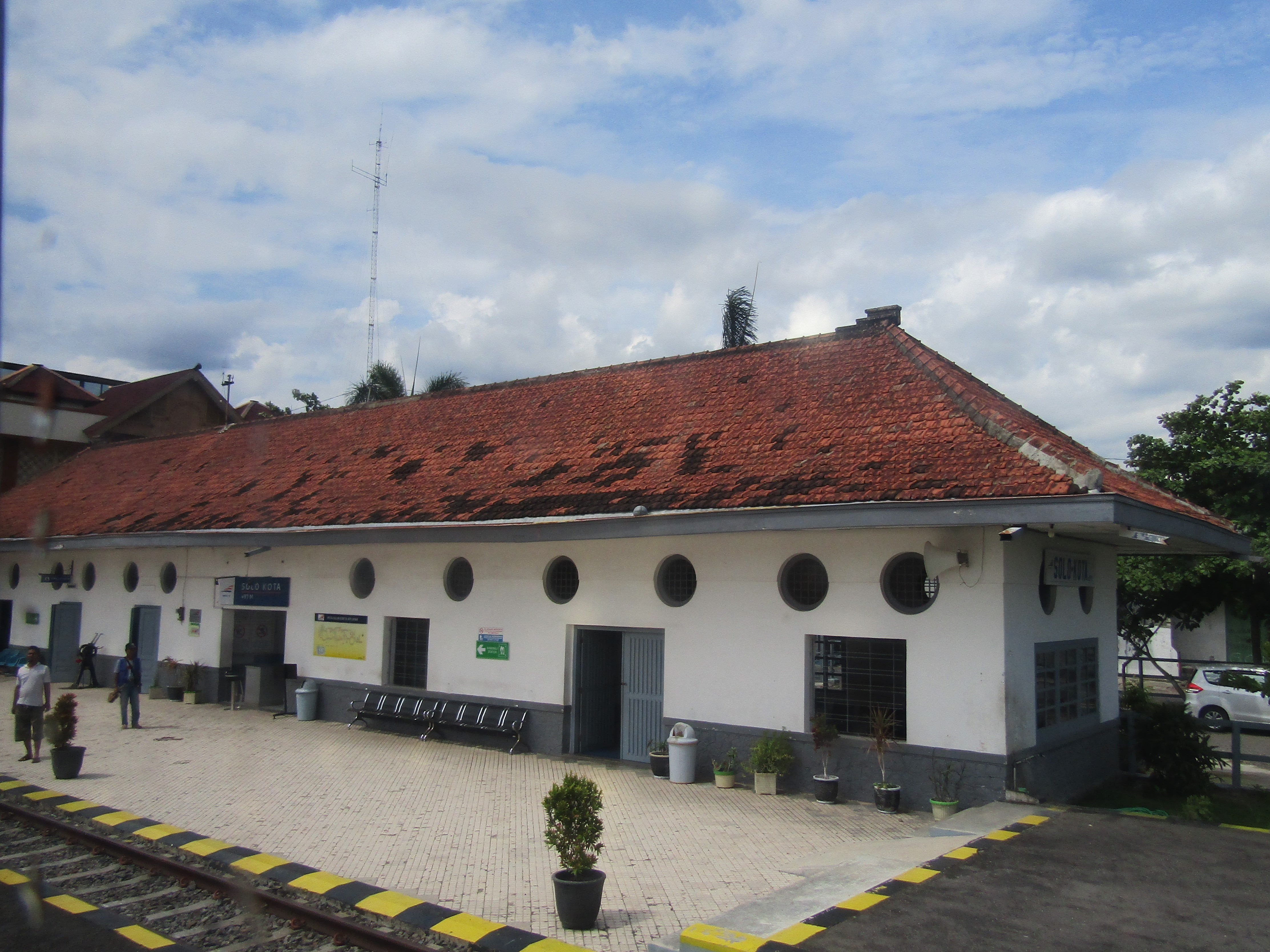 Stasiun Solo Kota (Sangkrah), 2020